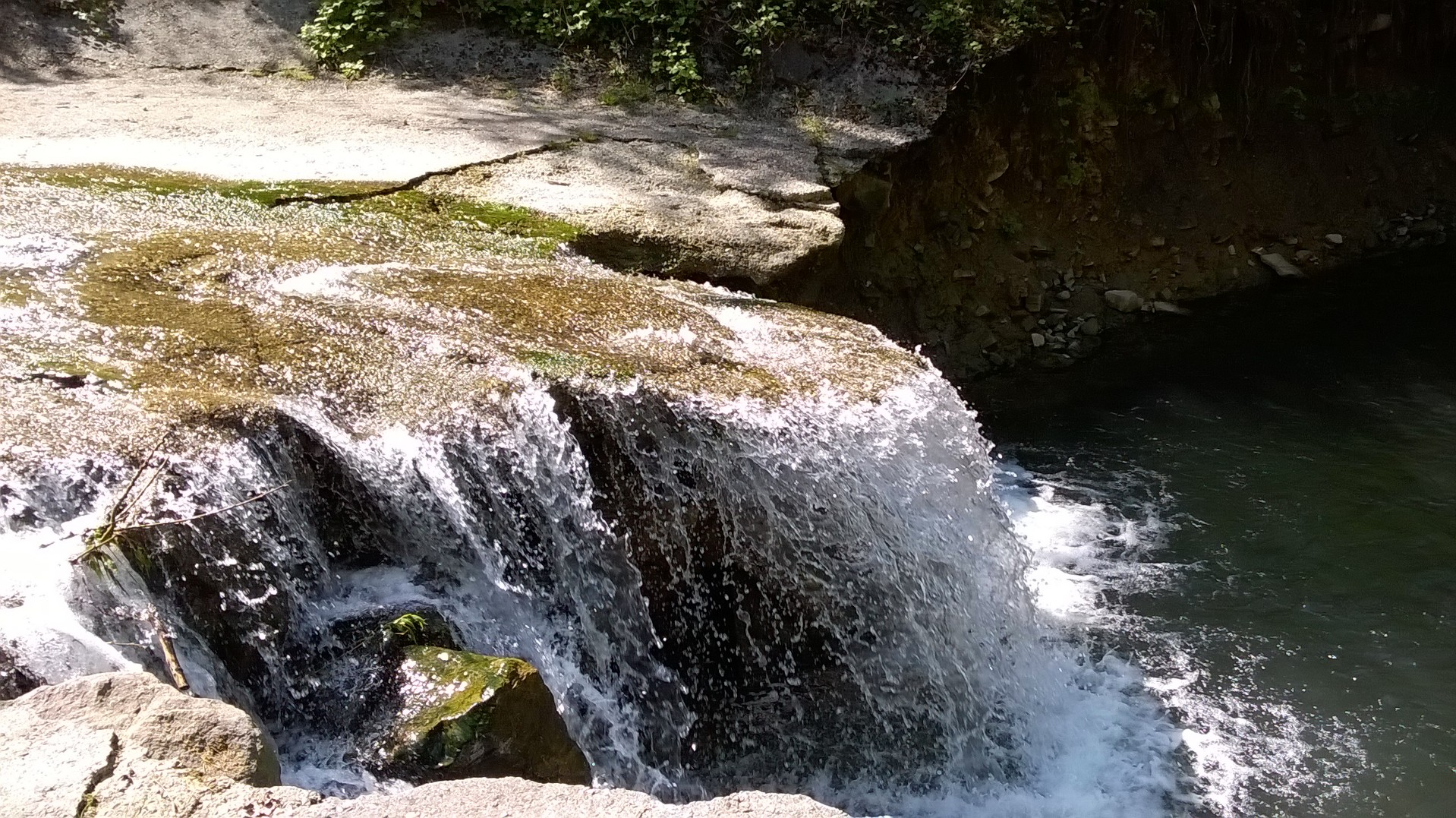 Park krajobrazowy Park Krajobrazowy Beskidu Śląskiego.